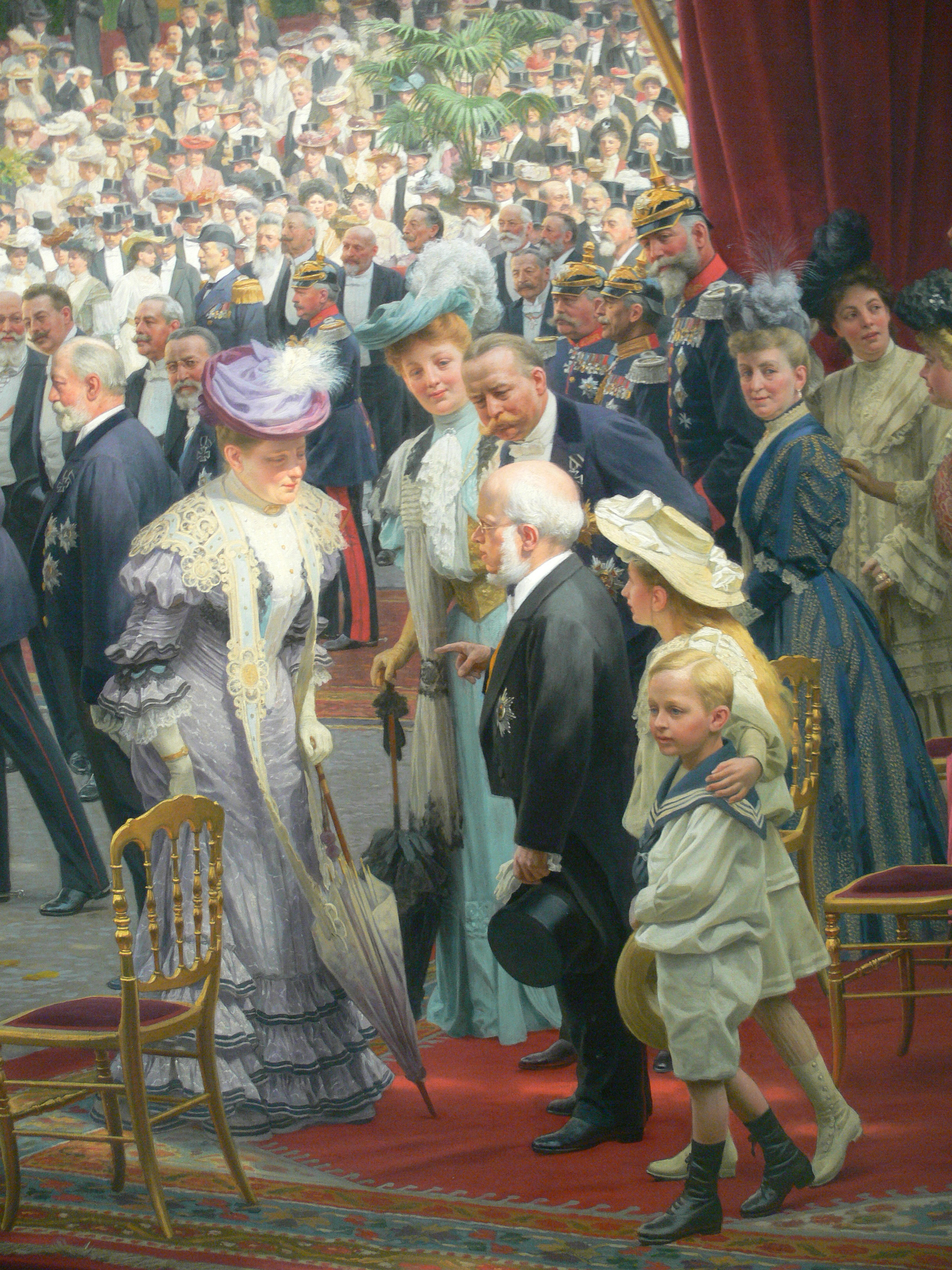 Anton von Werner: Enthüllung des Richard-Wagner-Denkmals im Tiergarten, Öl auf Leinwand, 1908 Berlinische Galerie Native nameBerlinische GalerieLocationBerlinCoordinates52° 30′ 15″ N, 13° 23′ 56″ E Established1975, 2004 (moved to present quarters)Website Detail